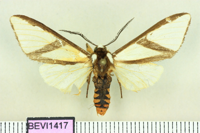 Turuptiana affinis